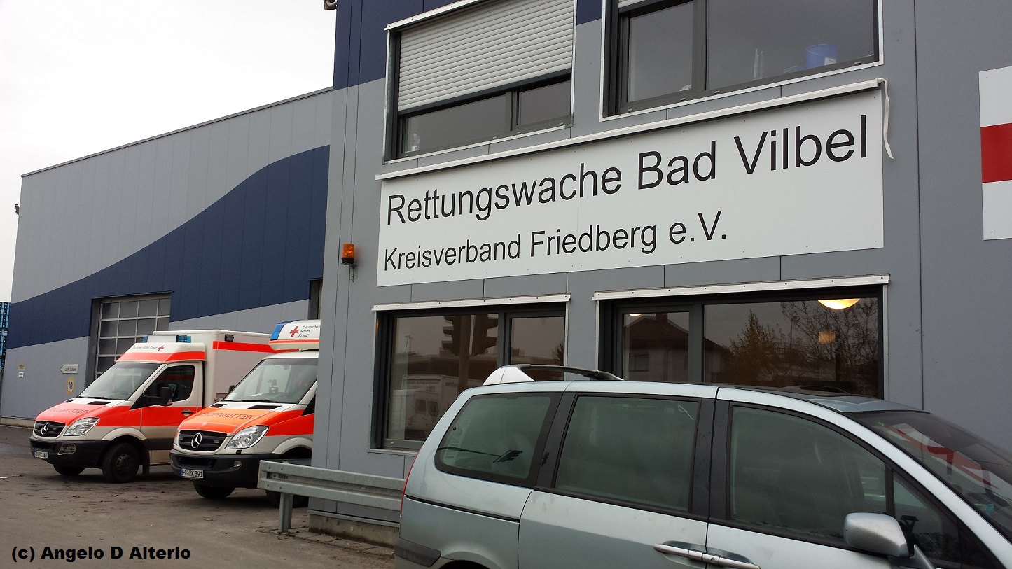 Die neue Rettungswache in Bad Vilbel